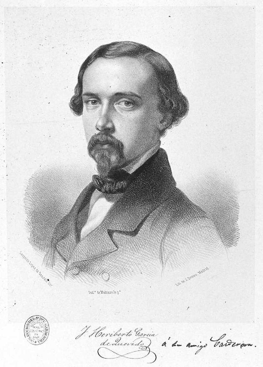 Retrato de José Heriberto García de Quevedo, litografía de Leopoldo López de Gonzalo por pintura de Federico de Madrazo, Madrid, Litografía de J. Donon. Facsímil del autógrafo "J. Heriberto García / de Quevedo". Biblioteca Nacional de España.